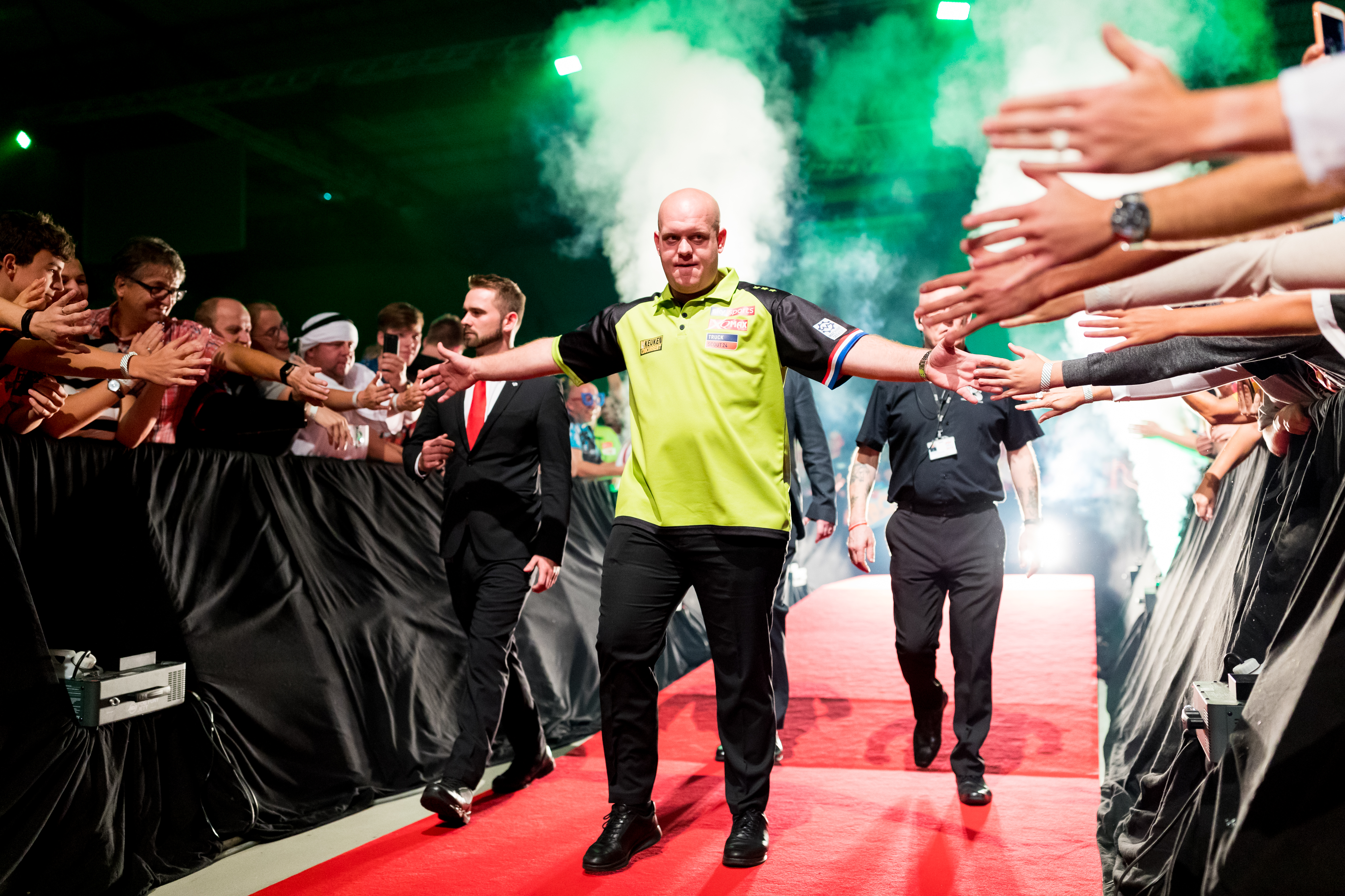 Michael van Gerwen 6:5 Krzysztof Ratajski during PDC Europe Darts Matchplay at Maimarkthalle, Mannheim, Baden-Württemberg, Germany on 2019-09-08, Photo: Sven Mandel